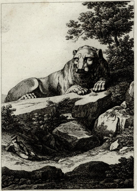 Lion on Kea island/Le lion de Kéa